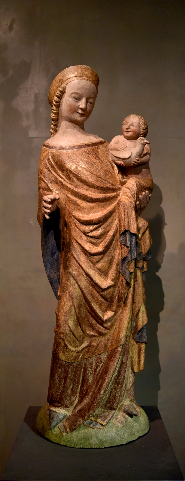 Madona z Dolní Kalné (1340-1350), Národní galerie v Praze